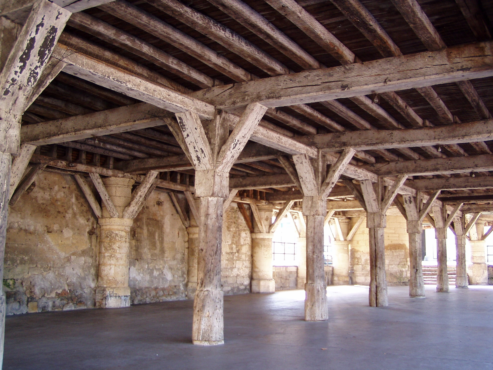 photographie de l'intérieur des halles de Fère-en-Tardenois, prise le 17 octobre 2006 par Accrochoc.